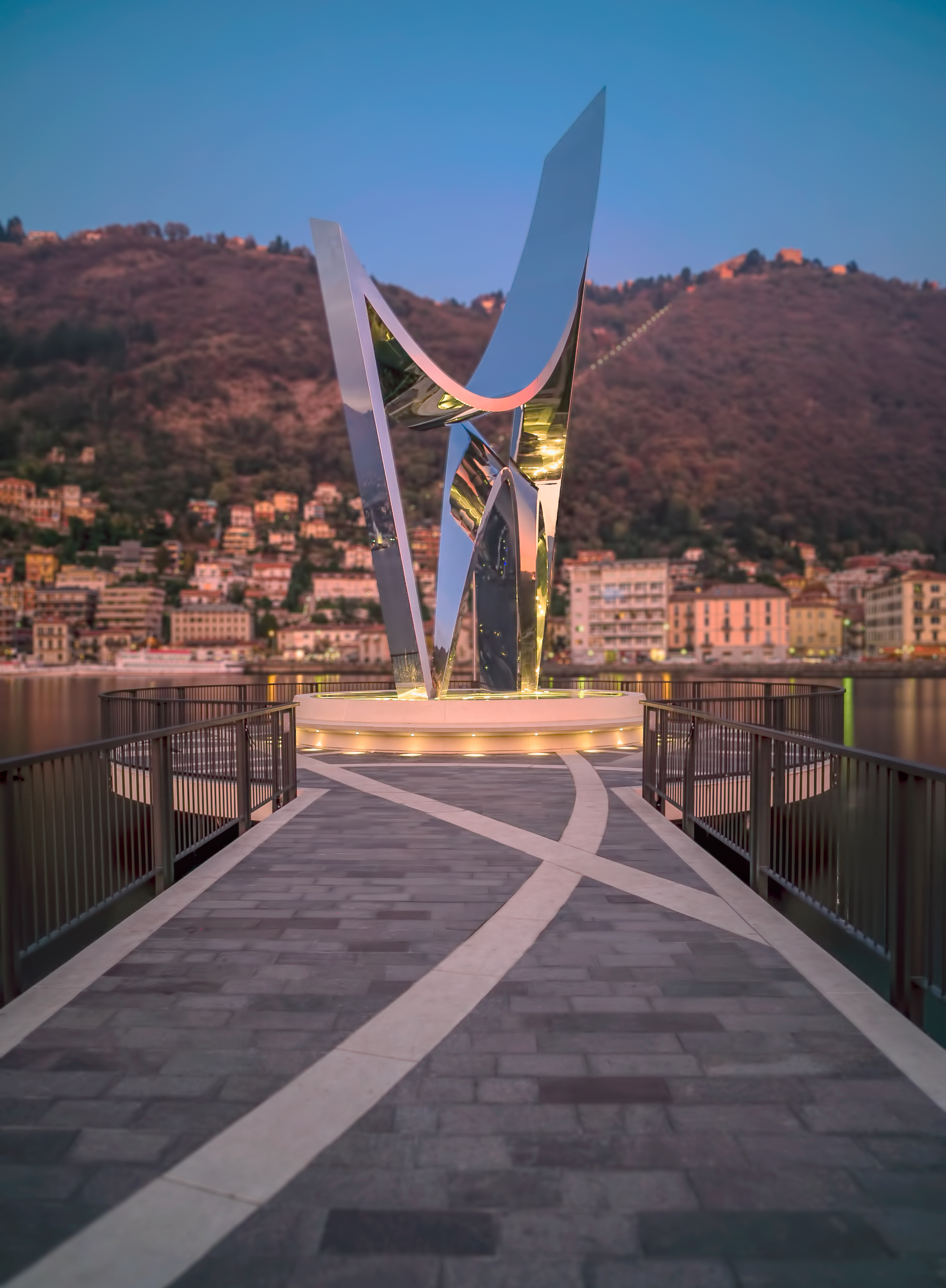 Monumento "The Life Electric" di Daniel Libeskind presso la diga foranea di Como. This is a photo of a monument which is part of cultural heritage of Italy.